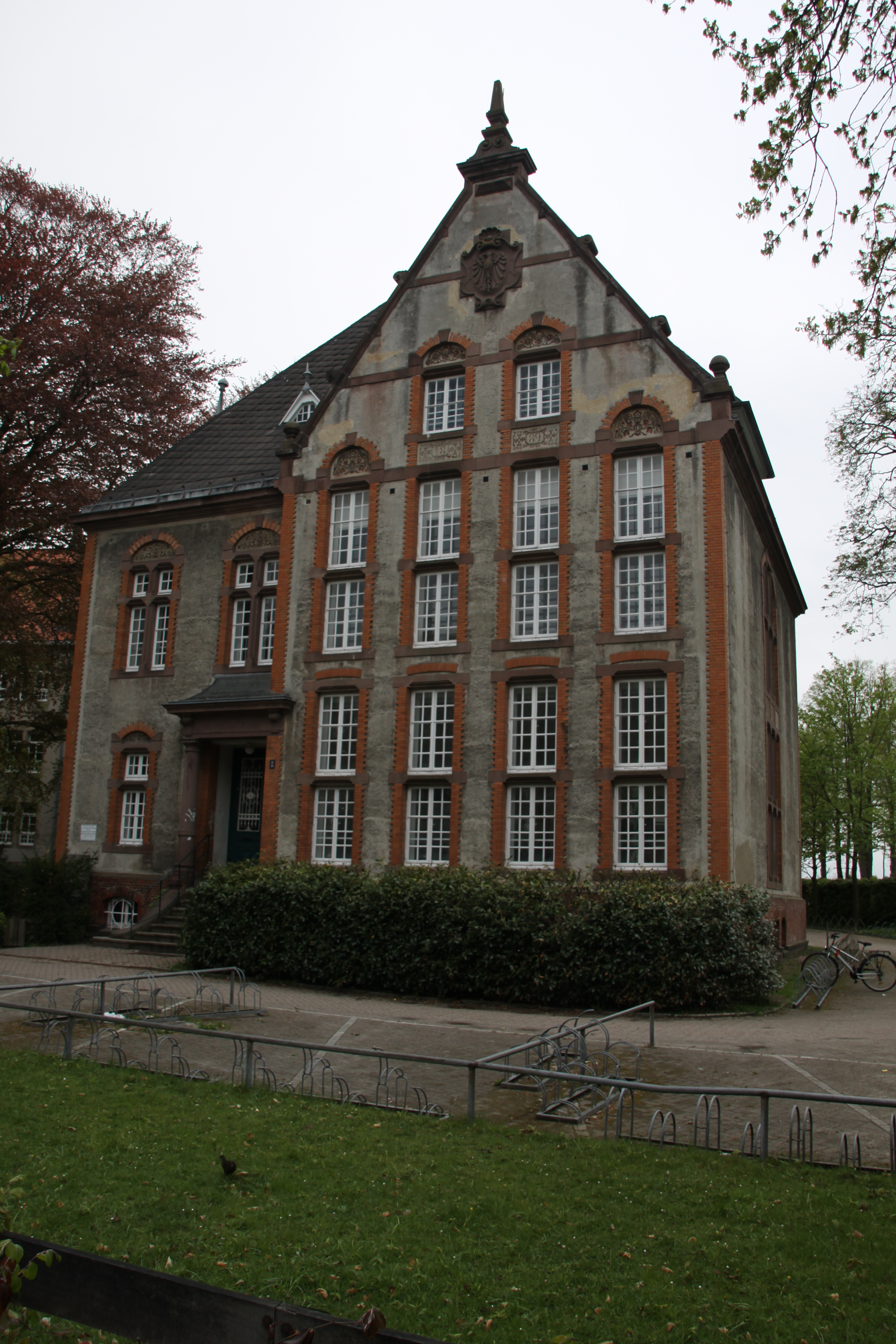 Staatsarchiv Aurich- historisches Dienstgebäude